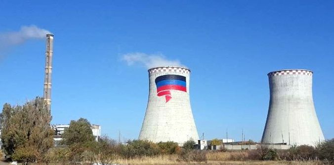 Самый большой флаг Донецкой Народной Республики. Распложен на первой градирне Зуевской Тепловой электрической станциив г.Зугрэс в 40км к востоку от столицы ДНР г. Донецк